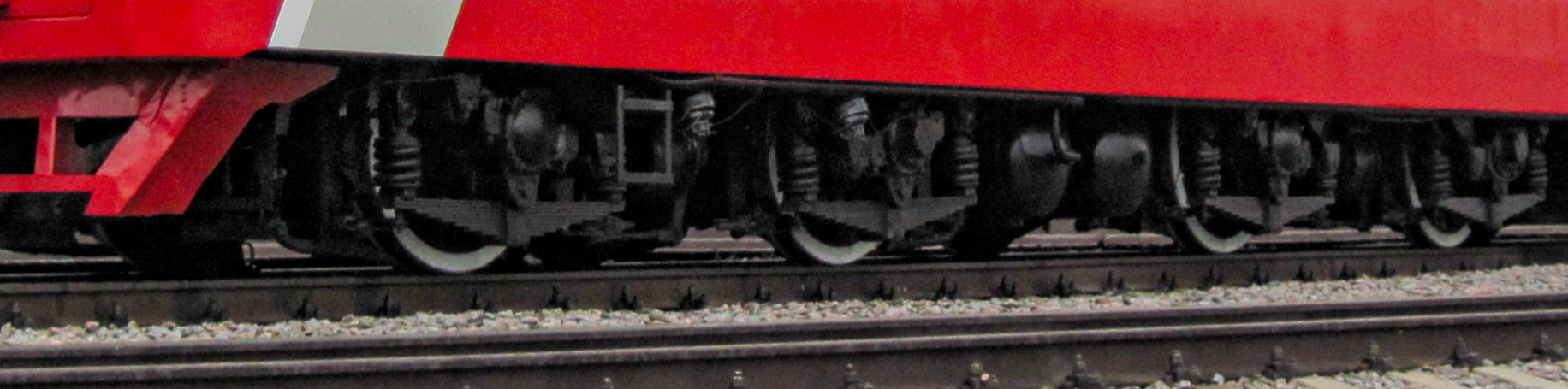 Передняя и средняя тележка газотурбовоза ГТ1-001